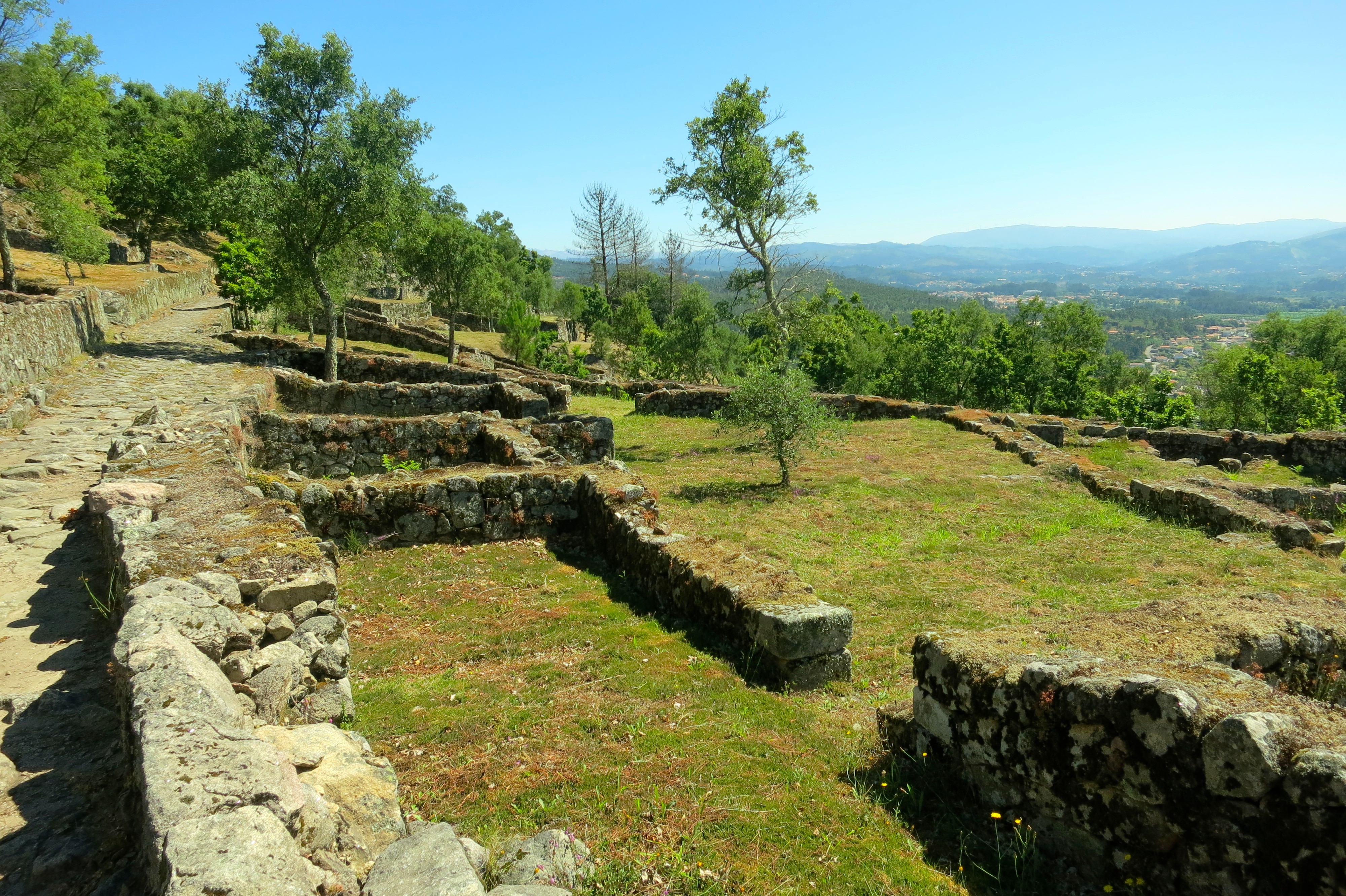 Citania de Briteiros